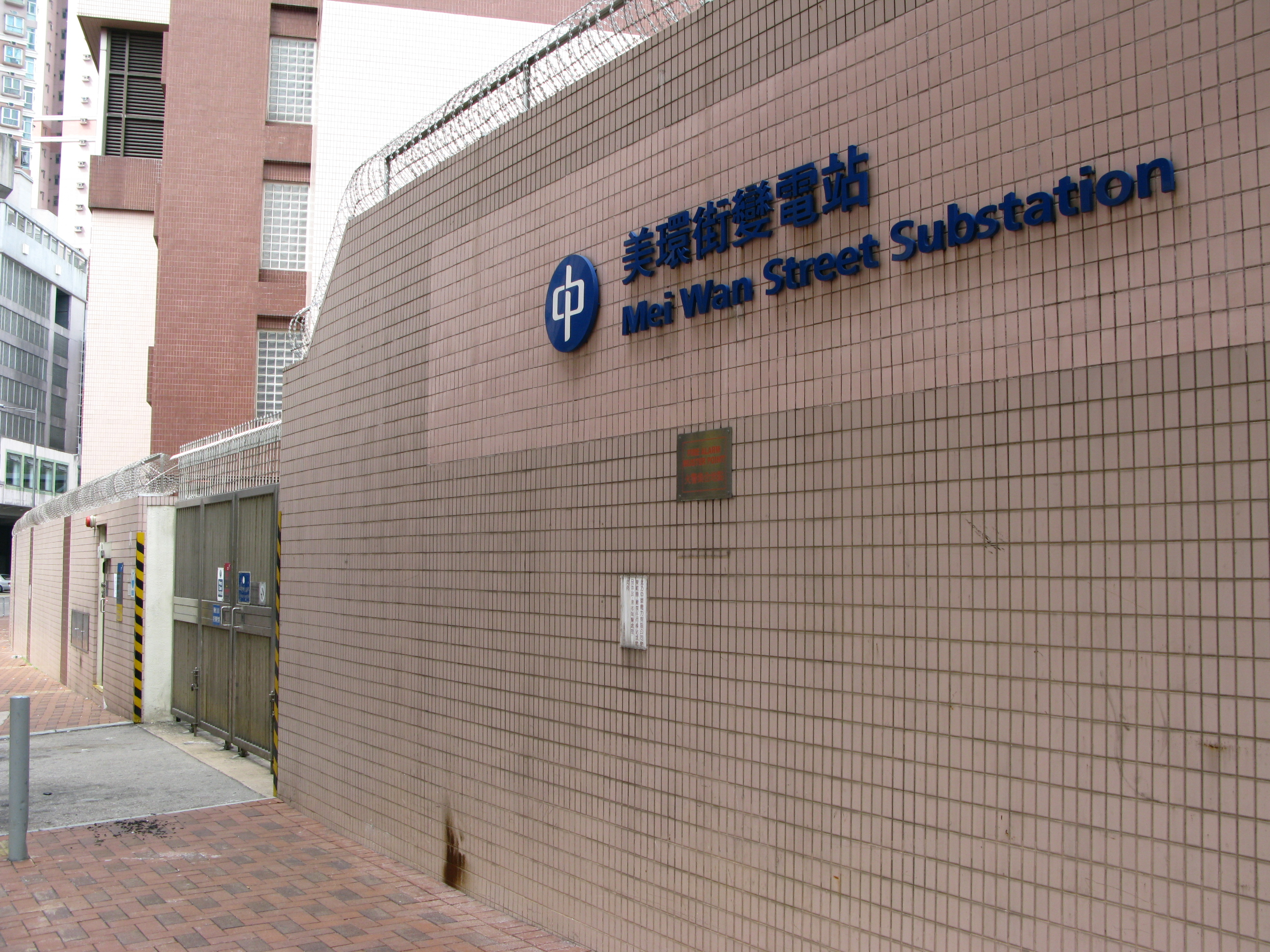 中文（香港）: 香港荃灣中華電力美環街變電站